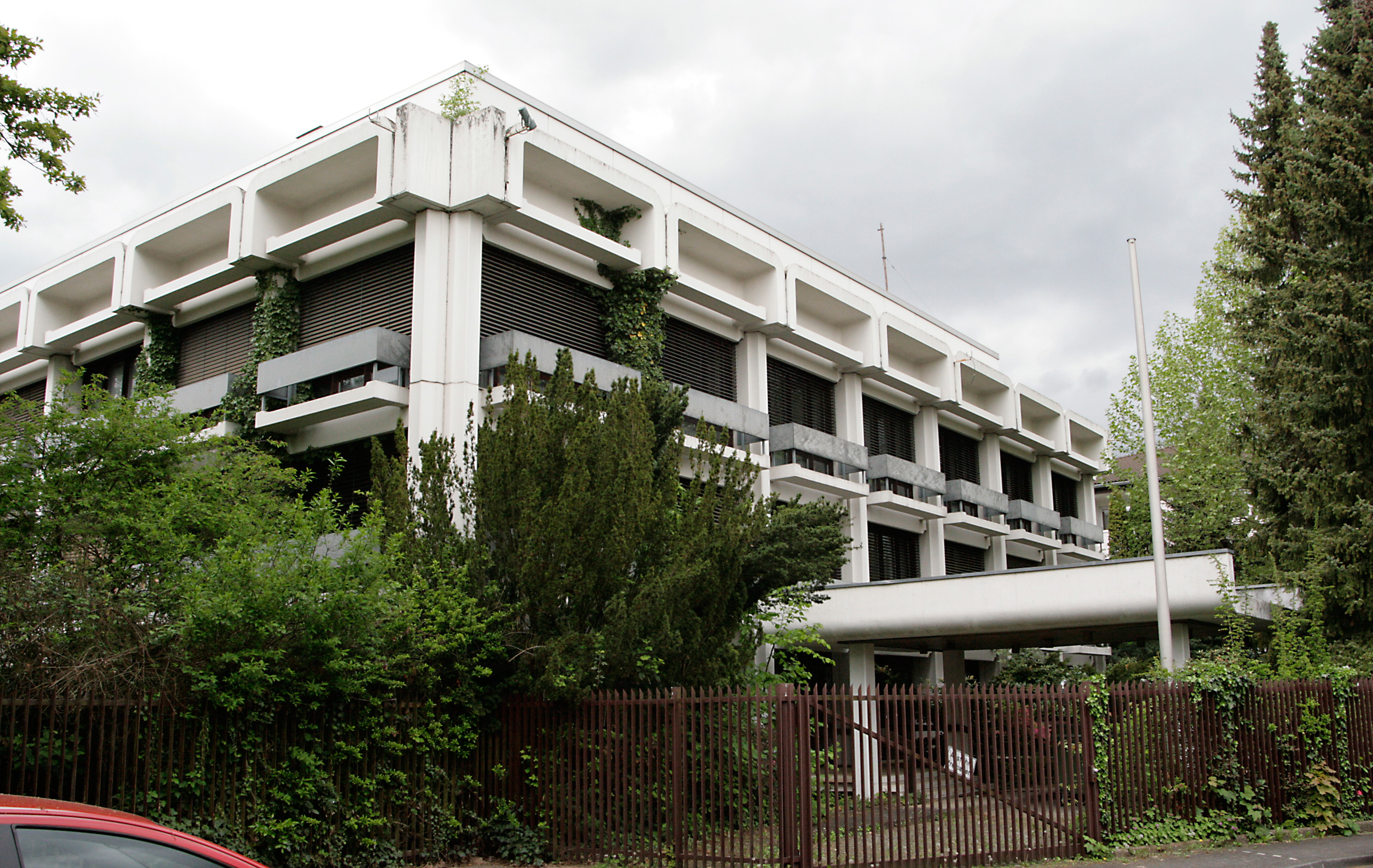 Gebäude der ehemaligen Botschaft der Republik Bulgarien, Auf der Hostert 6, Plittersdorf, Bad Godesberg, Bonn